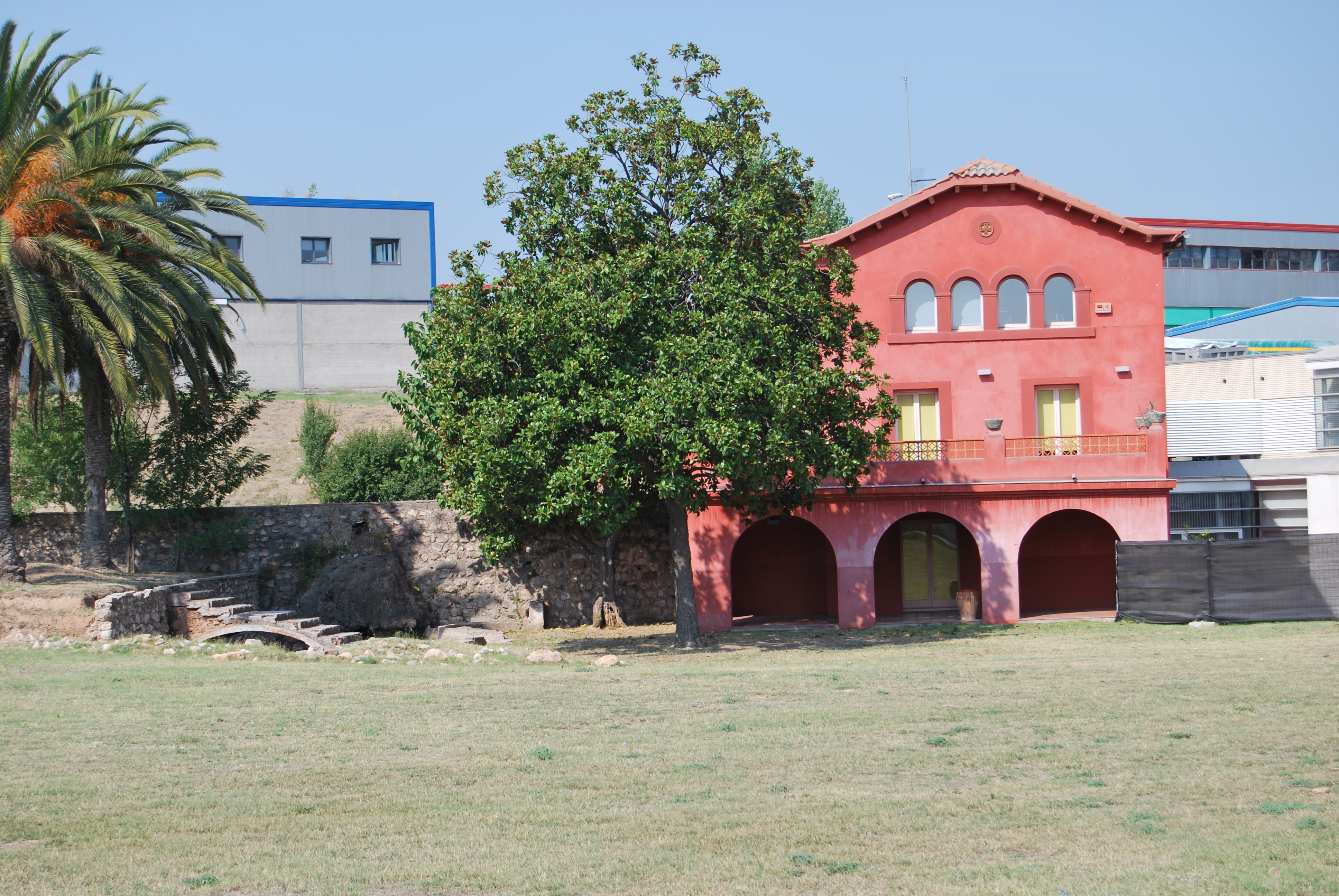 El Molí dels Frares (Sant Vicenç dels Horts)